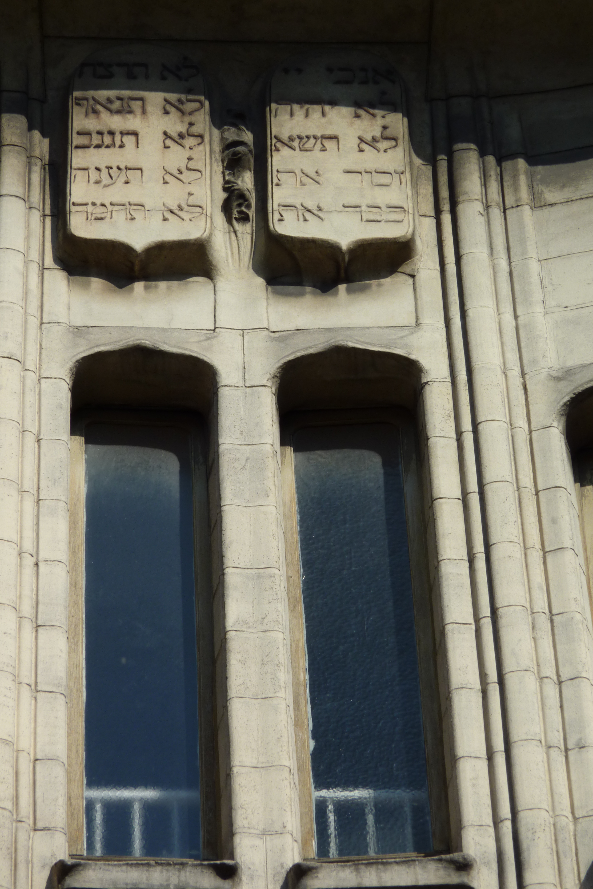 Paris, Synagoge in der Rue Pavée, Detail der Fassade: Gesetzestafeln